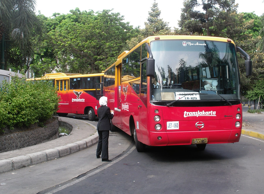 Ansicht eines Fahrzeugs der roten Linie mit Fahrerin davor.